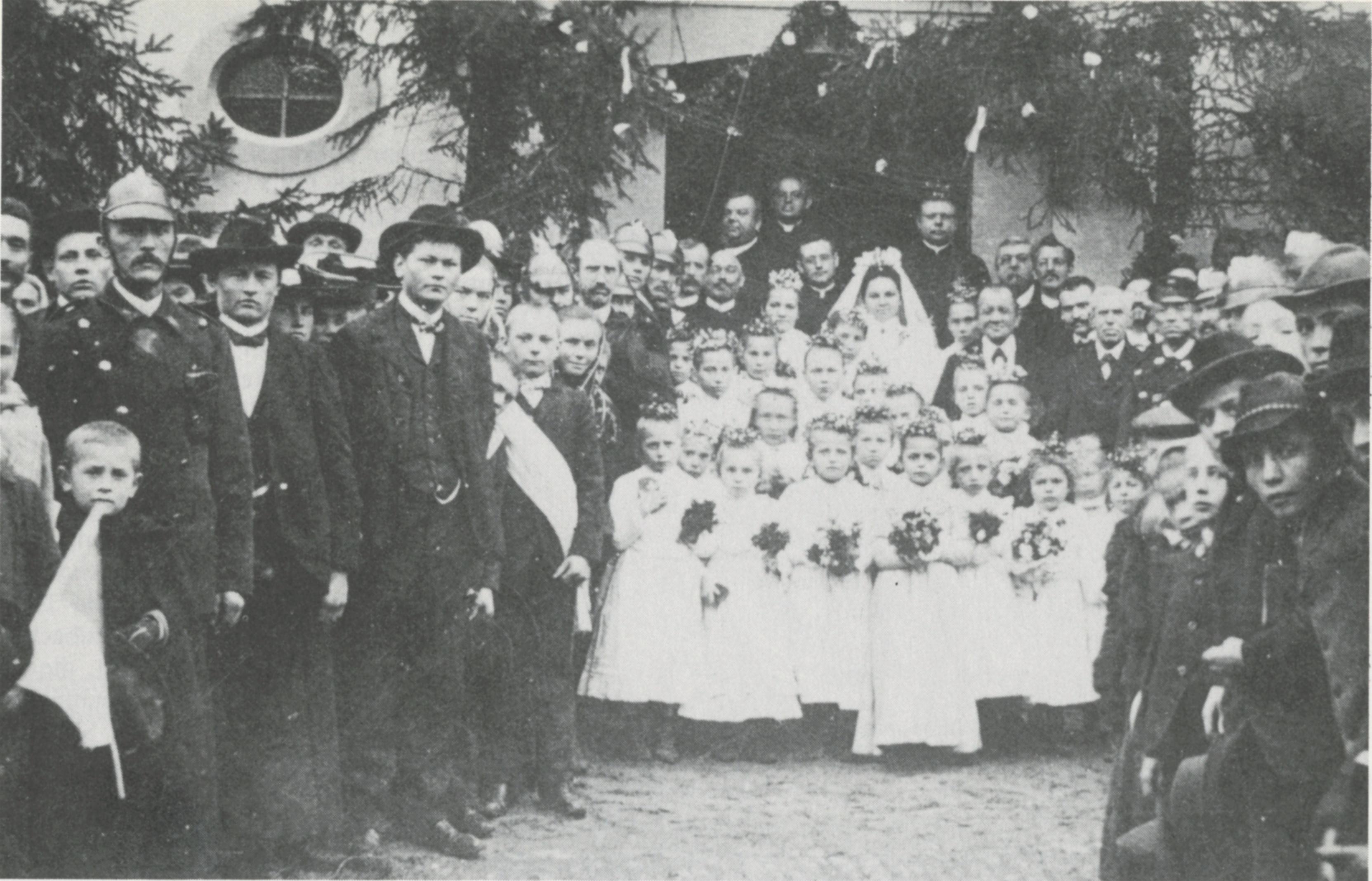 Fotografie von 1907. Einweihung der Vituskirche in Hörblach mit Pfarrer Melchior Faulhaber, Hauptlehrer Adalbert Zahn und Bürgermeister Valentin Reuß